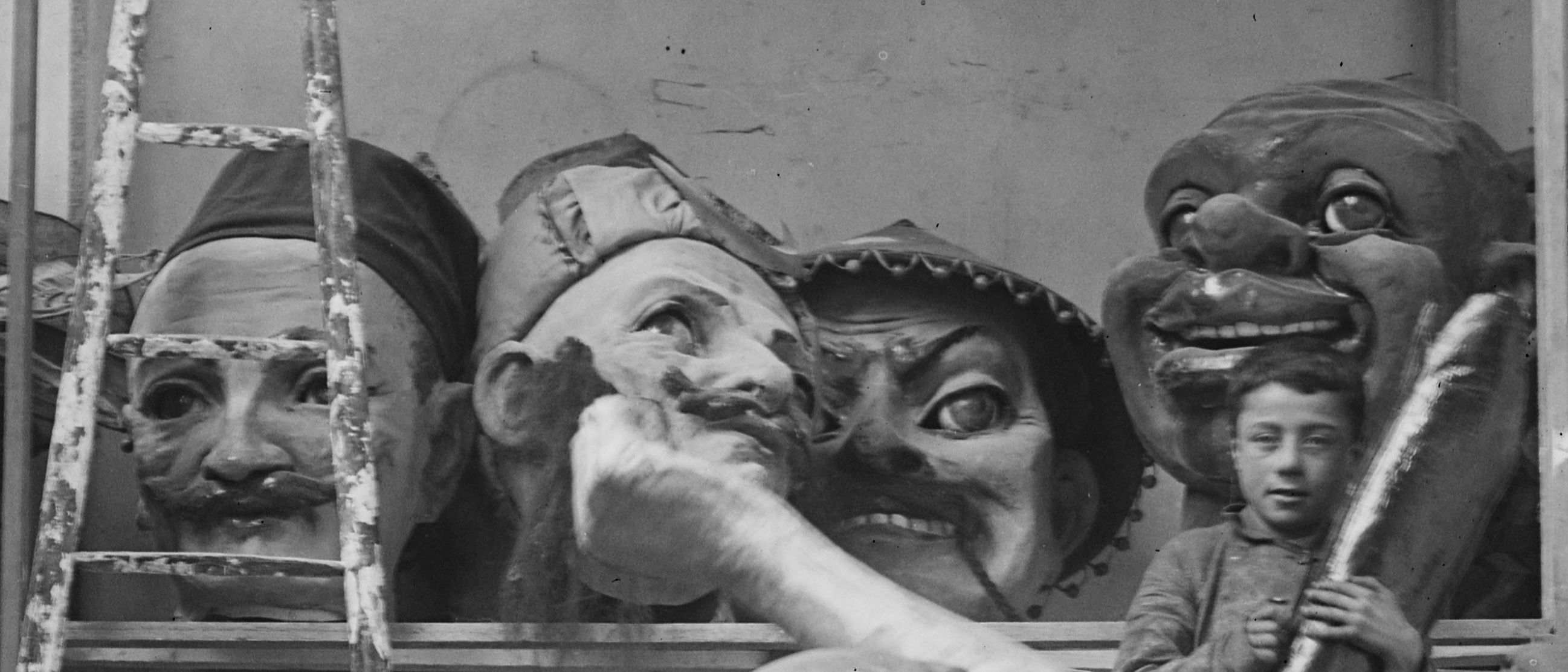 Grosses têtes du Carnaval de Paris.